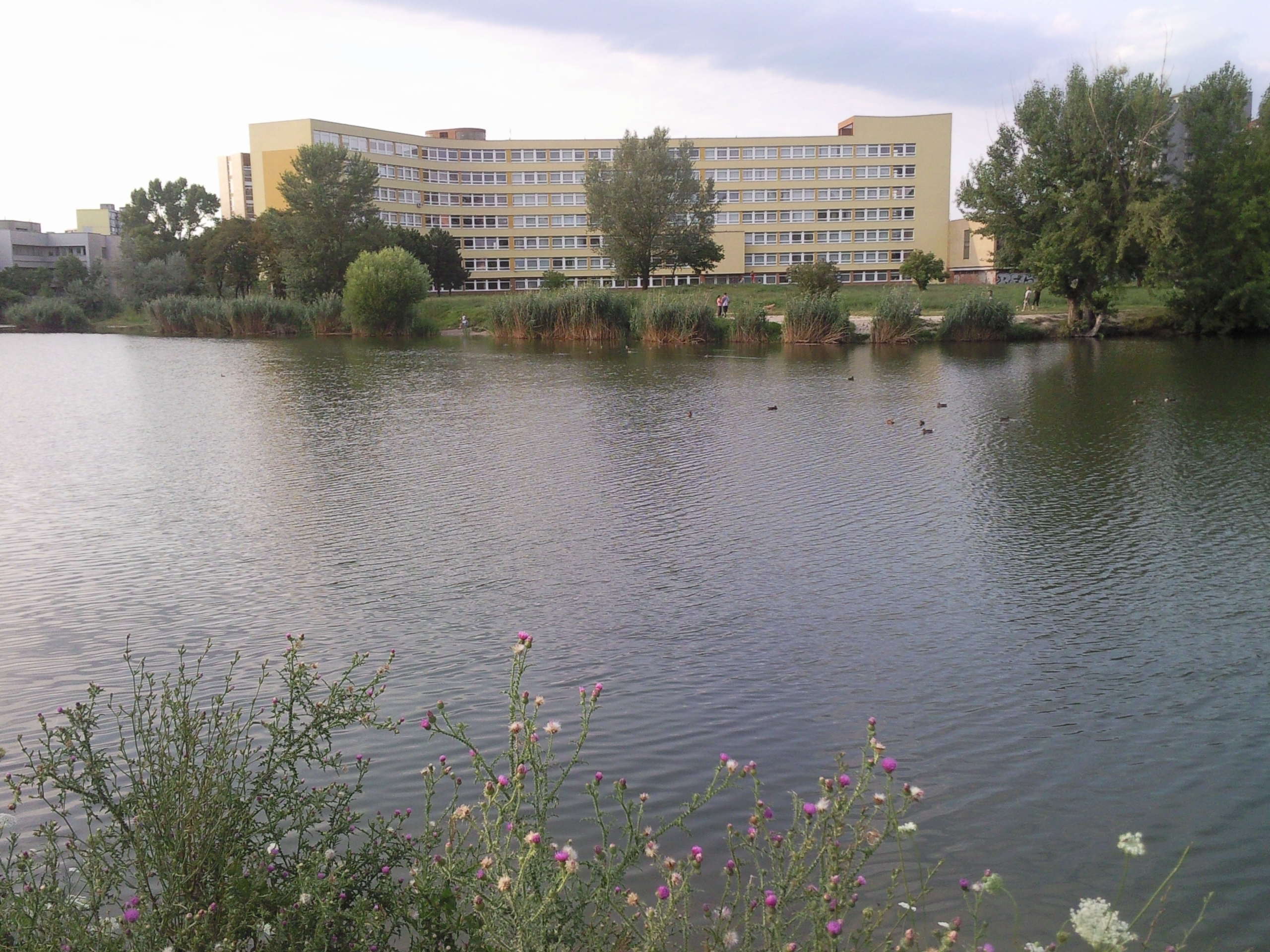 Rohlík-Ružinovské jazero lake, Bratislava